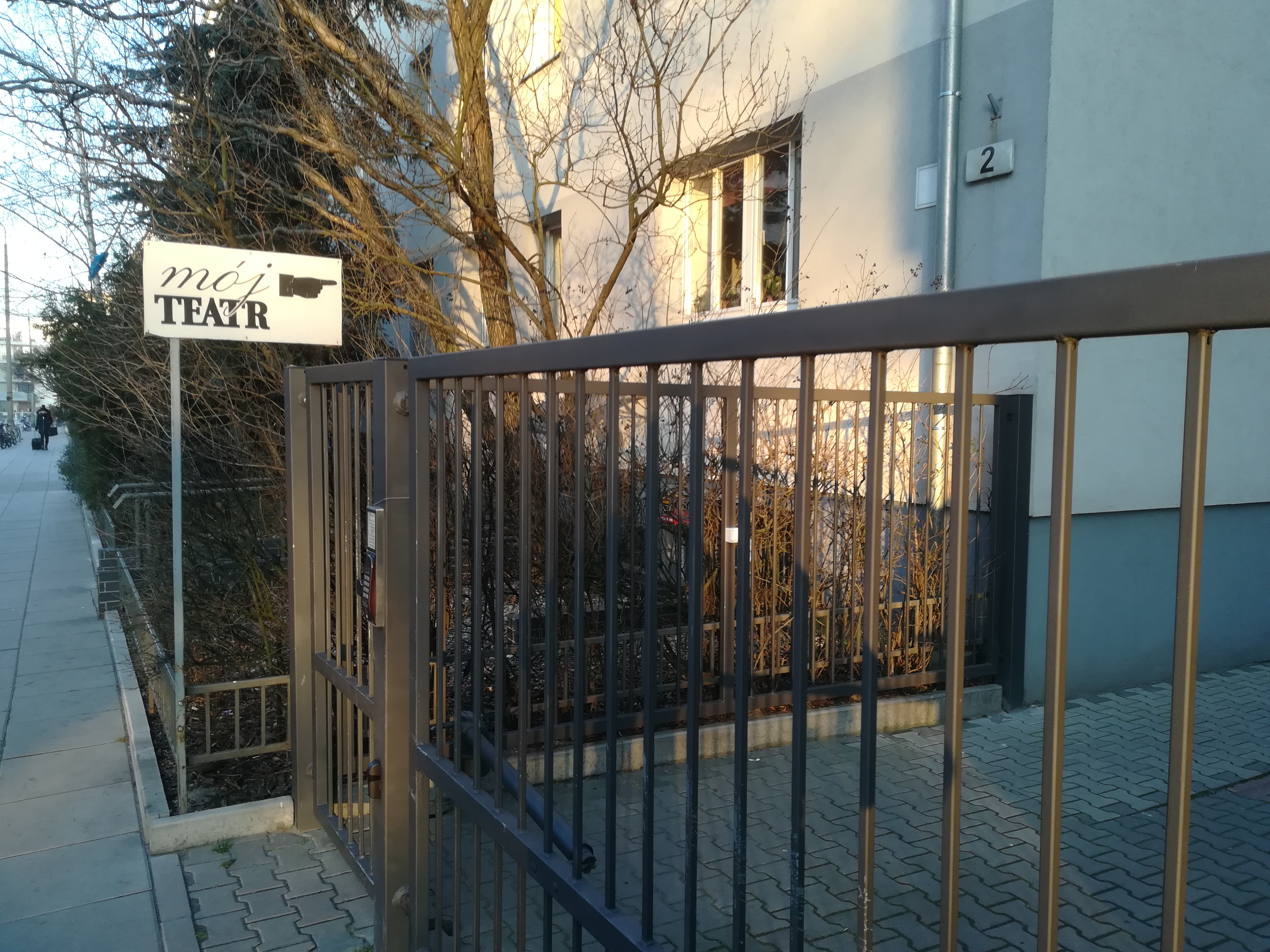 Wejście do Mojego Teatru w Poznaniu.